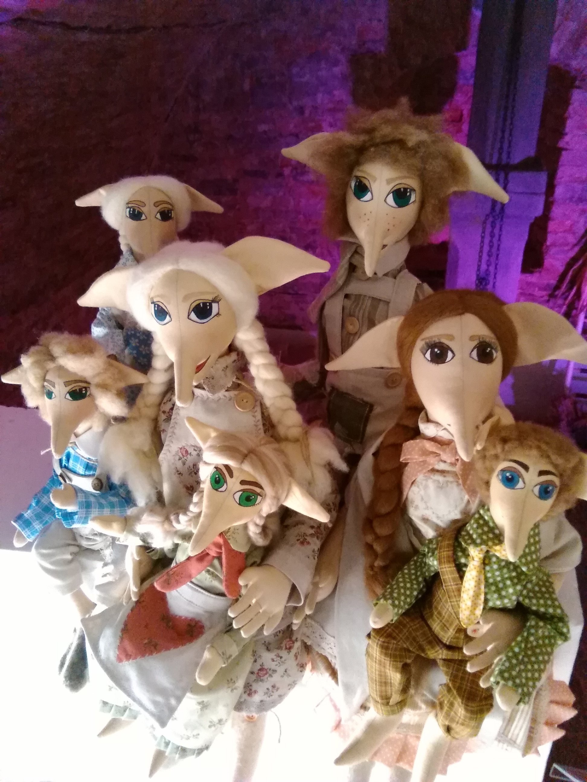 Děti picmoších rodin, které ve sklepě bíloveckého muzea bydlí